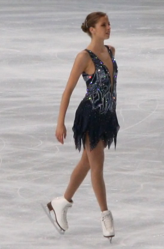 Каролина Костнер на 2011 Trophée Eric Bompard